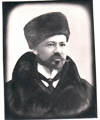 Павел Кузьмич Белецкий. Фотография около 1900 г.